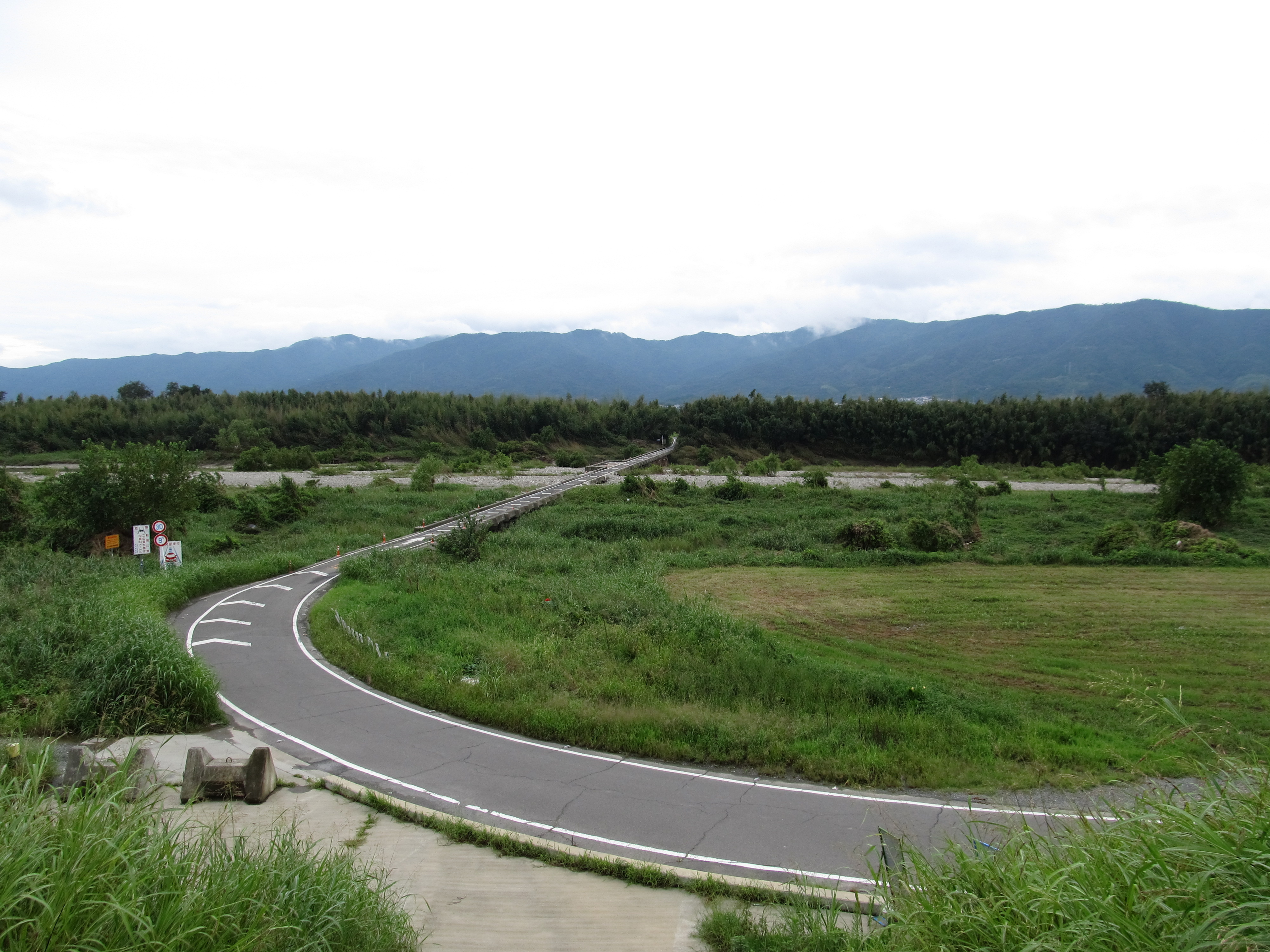 徳島県阿波市の吉野川に架かる潜水橋・大野島橋。 徳島県道237号切幡川島線の一部である。